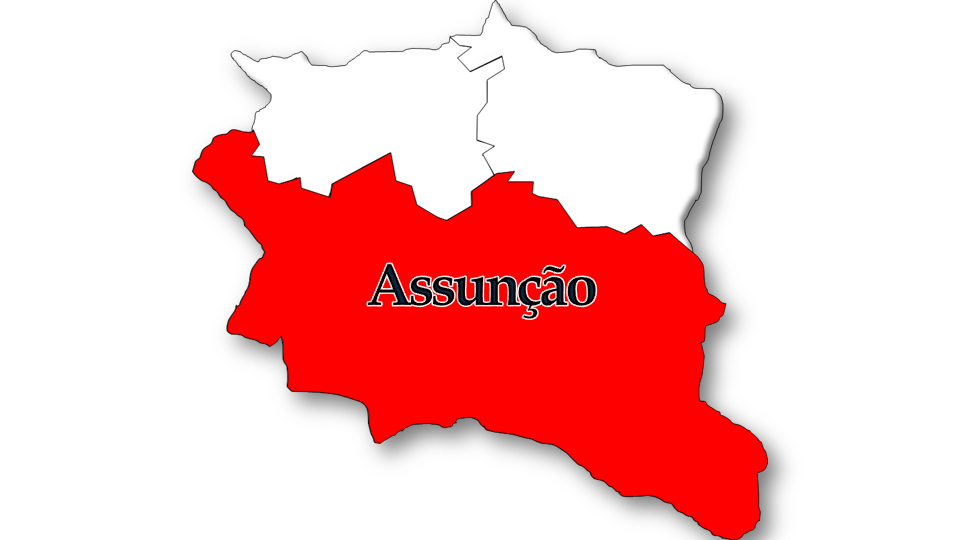 População